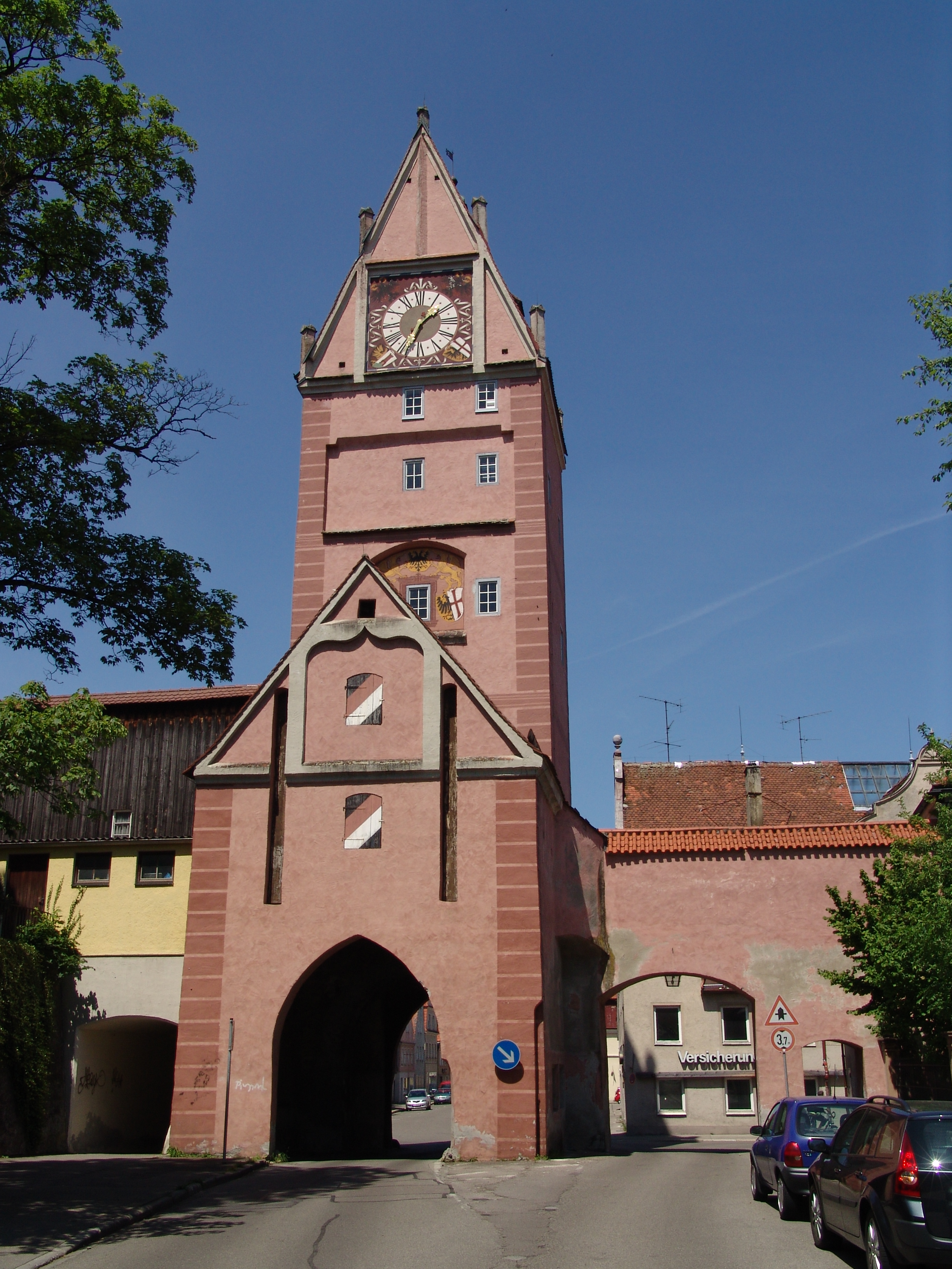 Memmingen, Kemptener Tor